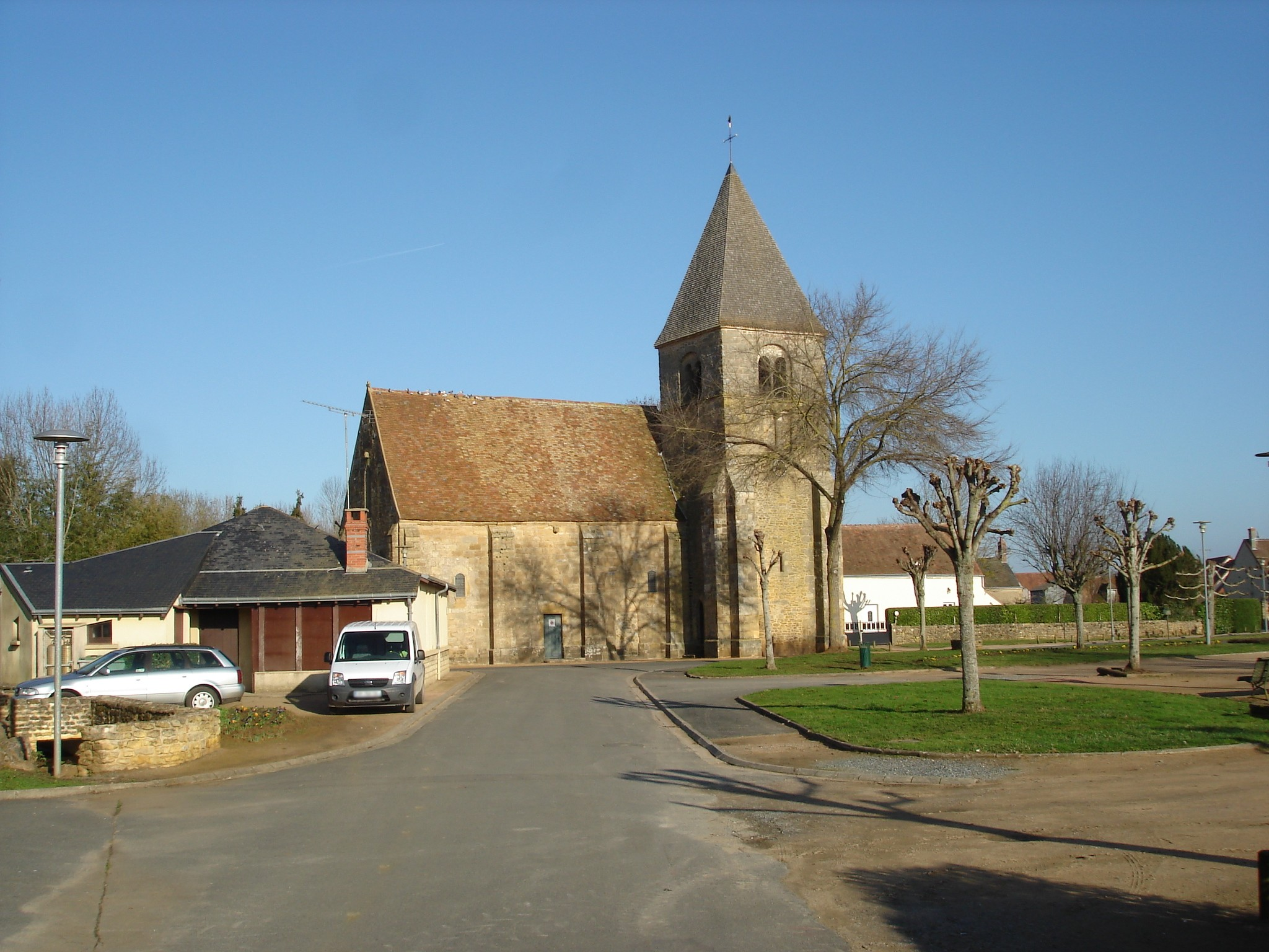 Lacs (36) : L'église Saint-Martin.